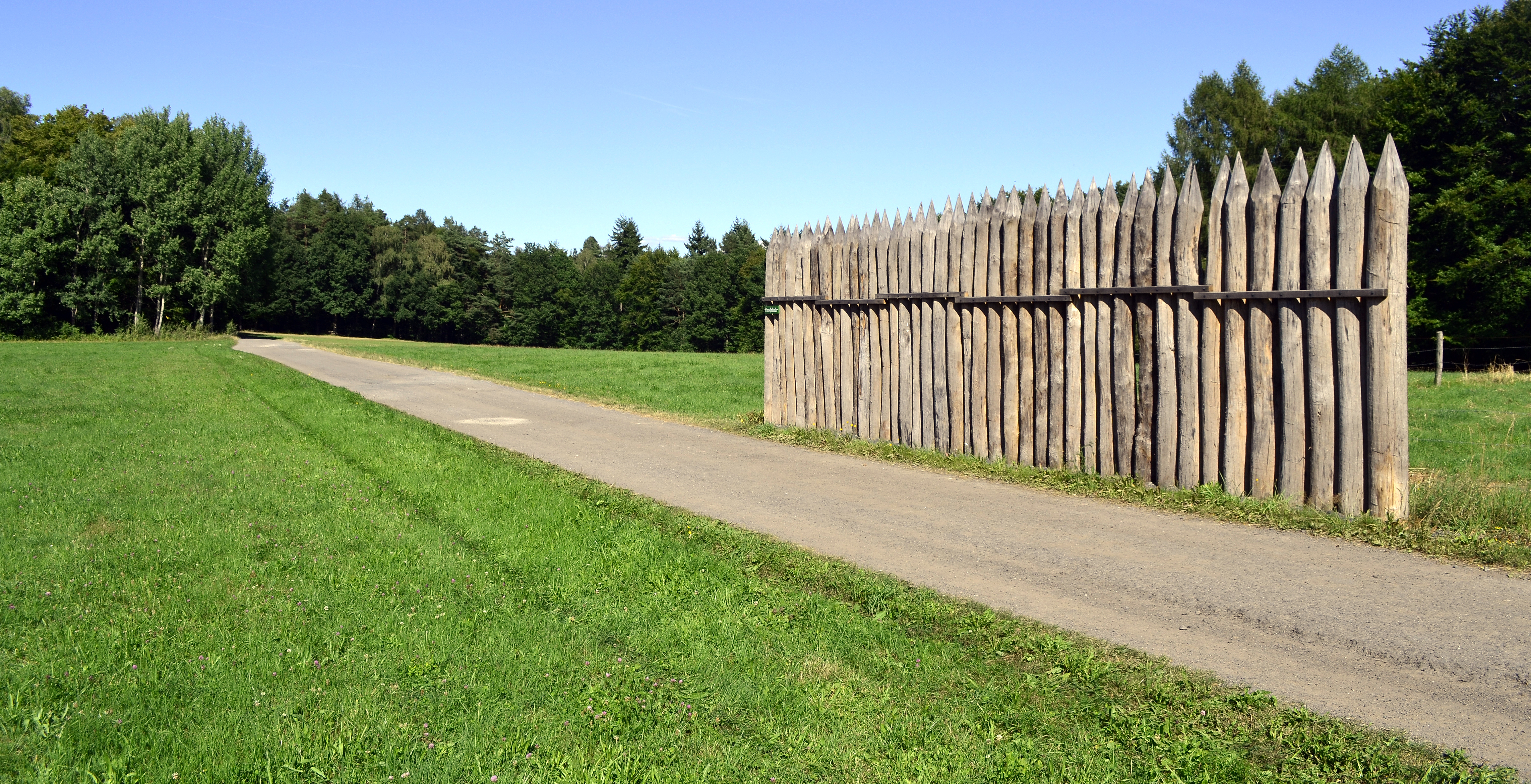 Rekonstruierte Limespalisade am Kastell Lützelbach (ORL 46) am Odenwaldlimes